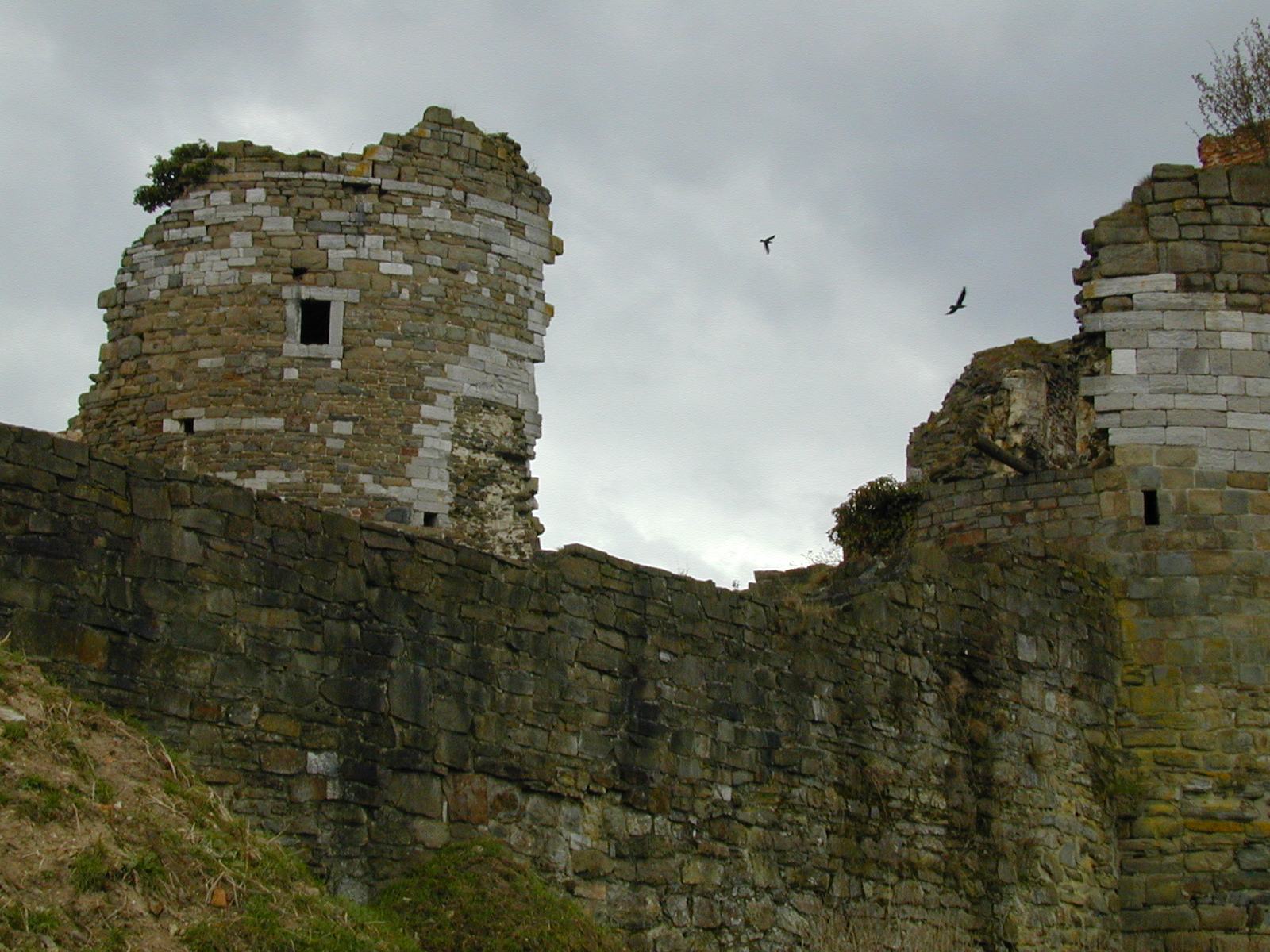 Foto toont links het torenrestant van de Grauwert, en geheel rechts de Noordwesttoren (Poorttoren). Genomen vanuit de noordzijde van de kasteelruïne. 8 April 2006 Bart van Pol. De maker heeft deze foto vrijgegeven voor gebruik onder de GNU FDL.